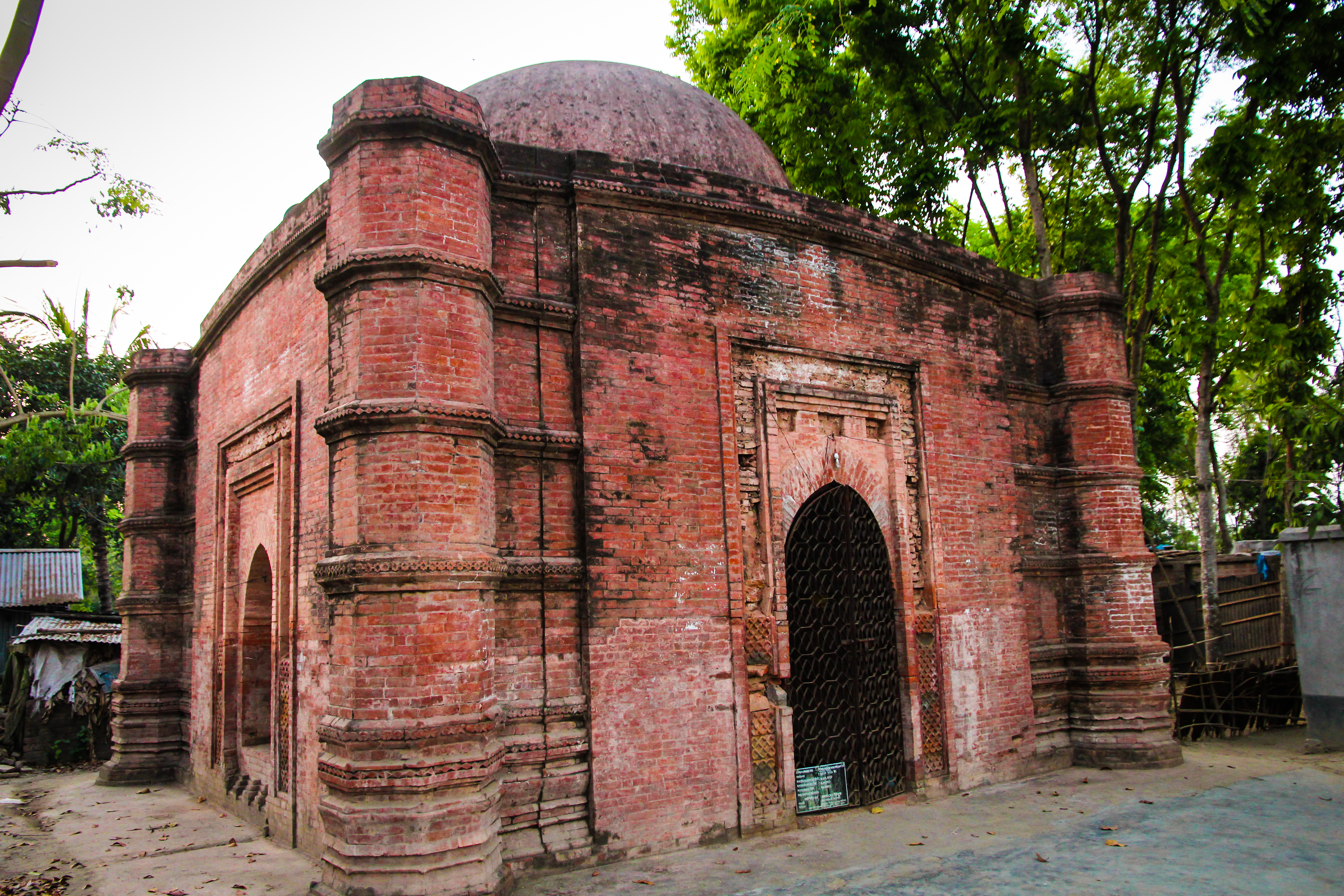 পাঠাগার ঢিবি